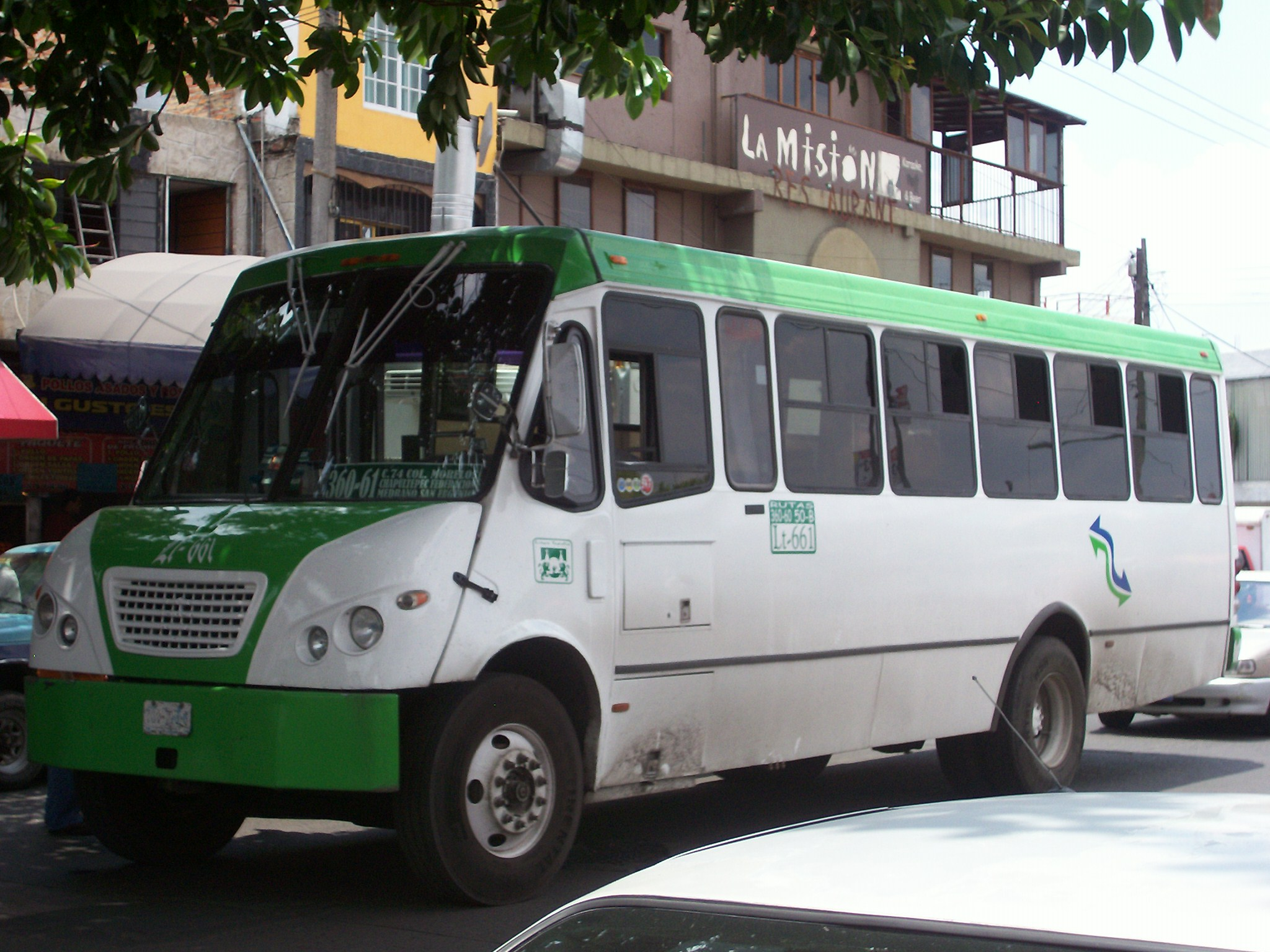 Autobus de la empresa de Transporte guadalajara, Linea Tapatia A.C.